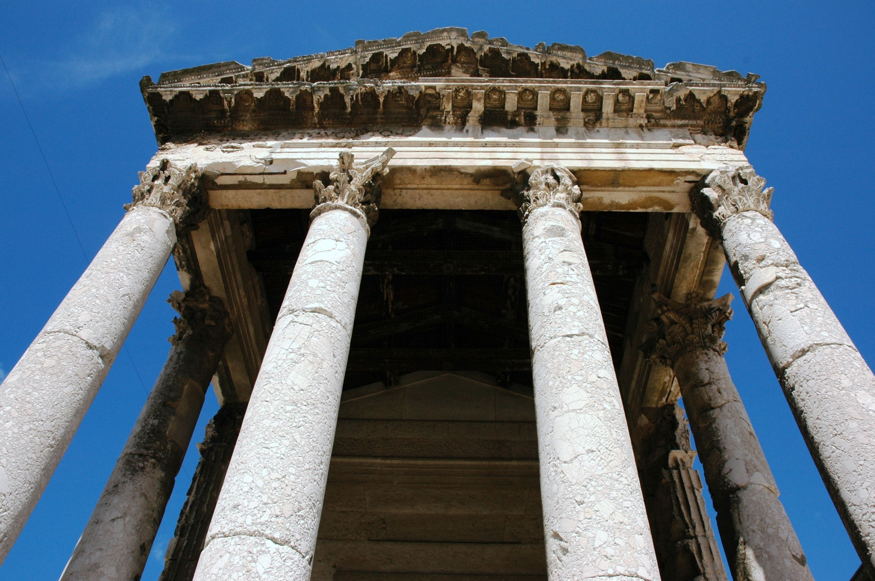 Temple d'August de Pula